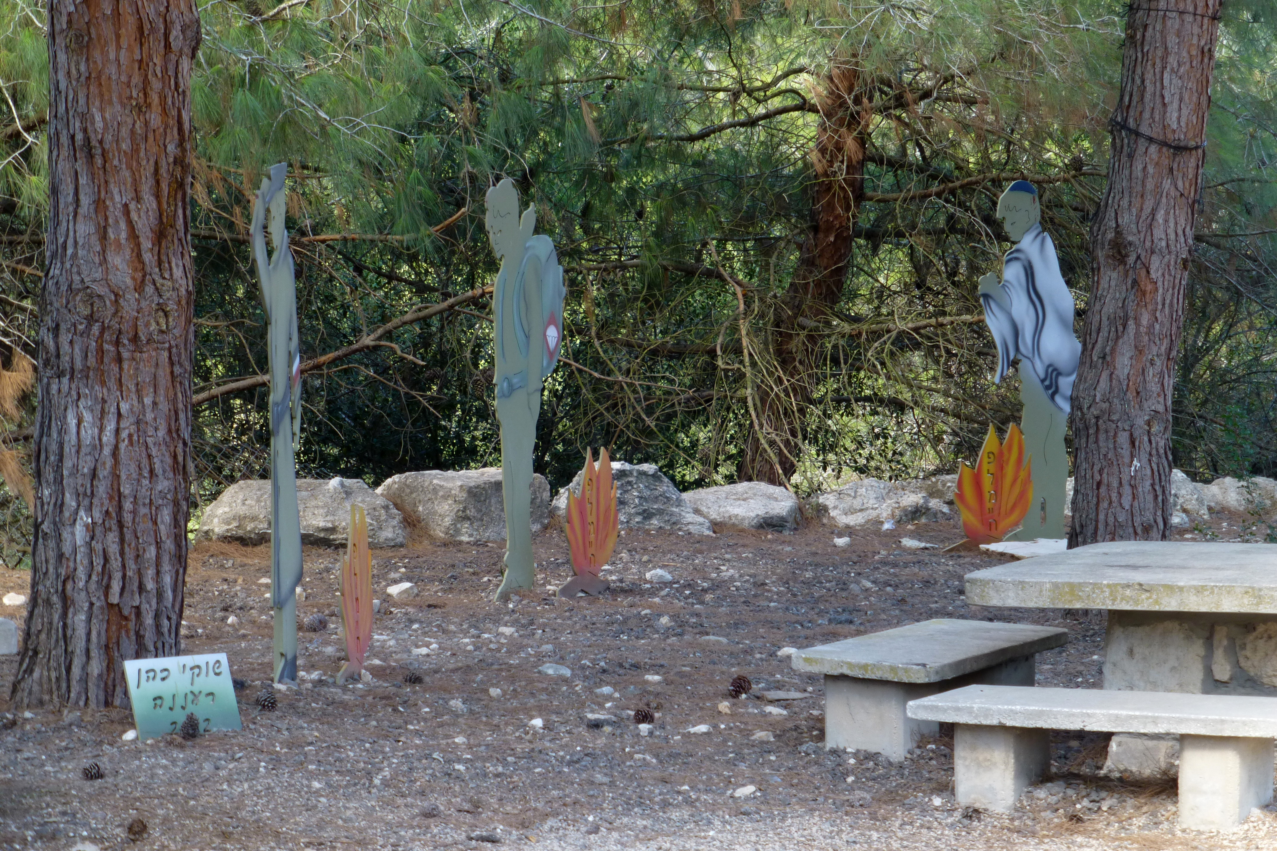 מערת הפלמ"ח במשמר העמק